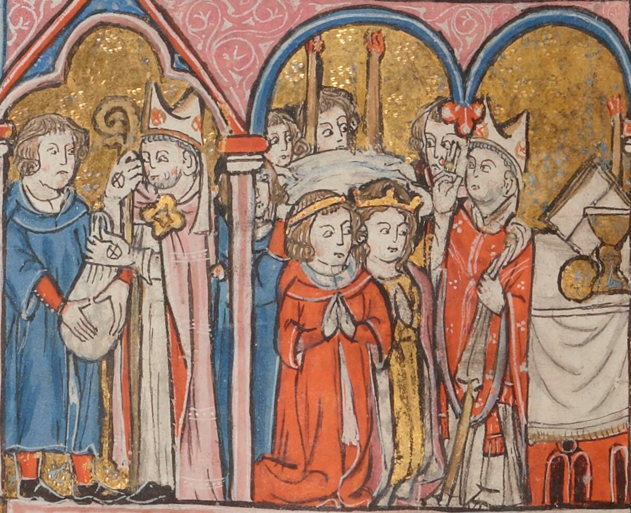 Onfroi IV vendant son épouse+Mariage de Conrad de Montferrat et d'Isabelle de Jérusalem